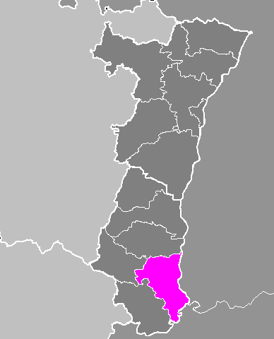 Maps of arrondissements and cantons of France: Arrondissement de Mulhouse.PNG (Région Alsace)